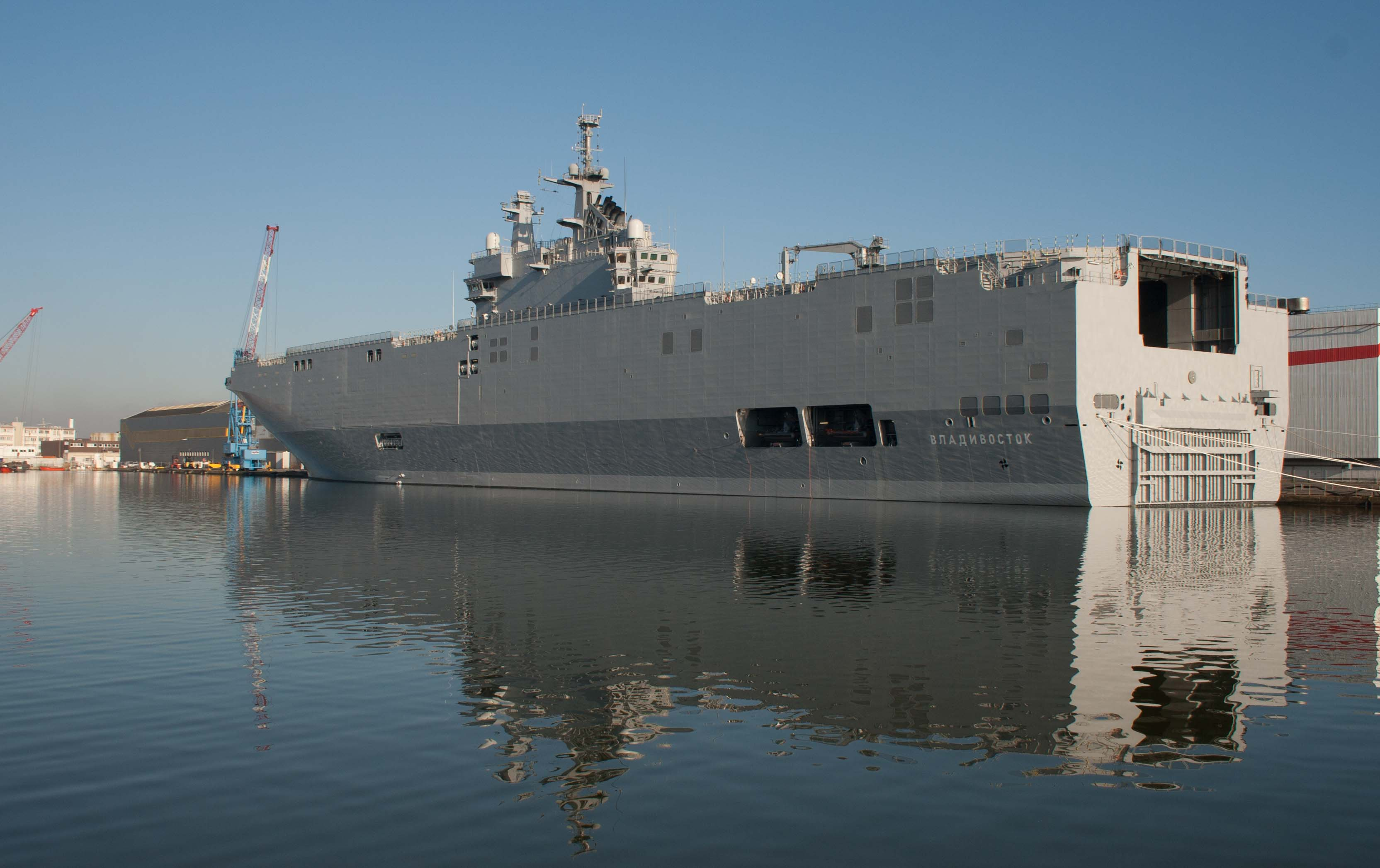 Le Vladivostock, BPC, en construction dans le port de Saint-Nazaire en décembre 2014.